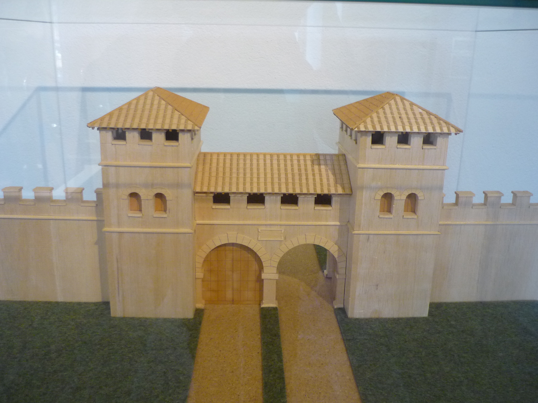 Rekonstruktion der Porta Principalis Dextra des römischen Kastell Comagena